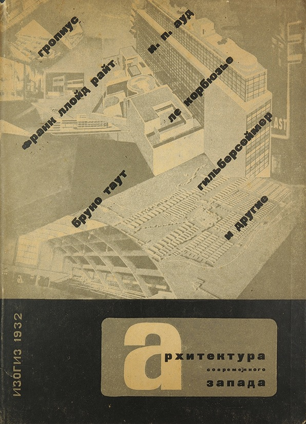 Архитектура современного запада / общ. ред. Д. Аркин, худ. Л. Лисицкий. М.: Изогиз, 1932. 186 c., ил., 19 л. ил. 7000 экз. 27 х 19 см.